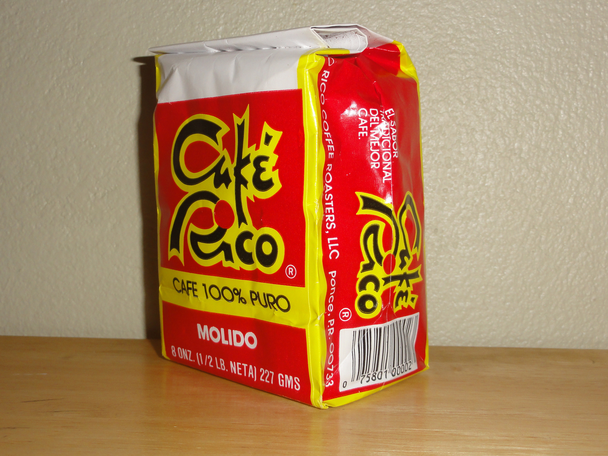 Bolsa de Café Rico, fabricado en Ponce, Puerto Rico